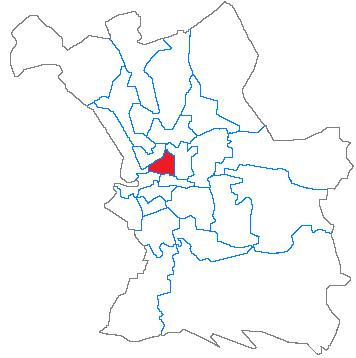 Situation du canton dans la ville de Marseille